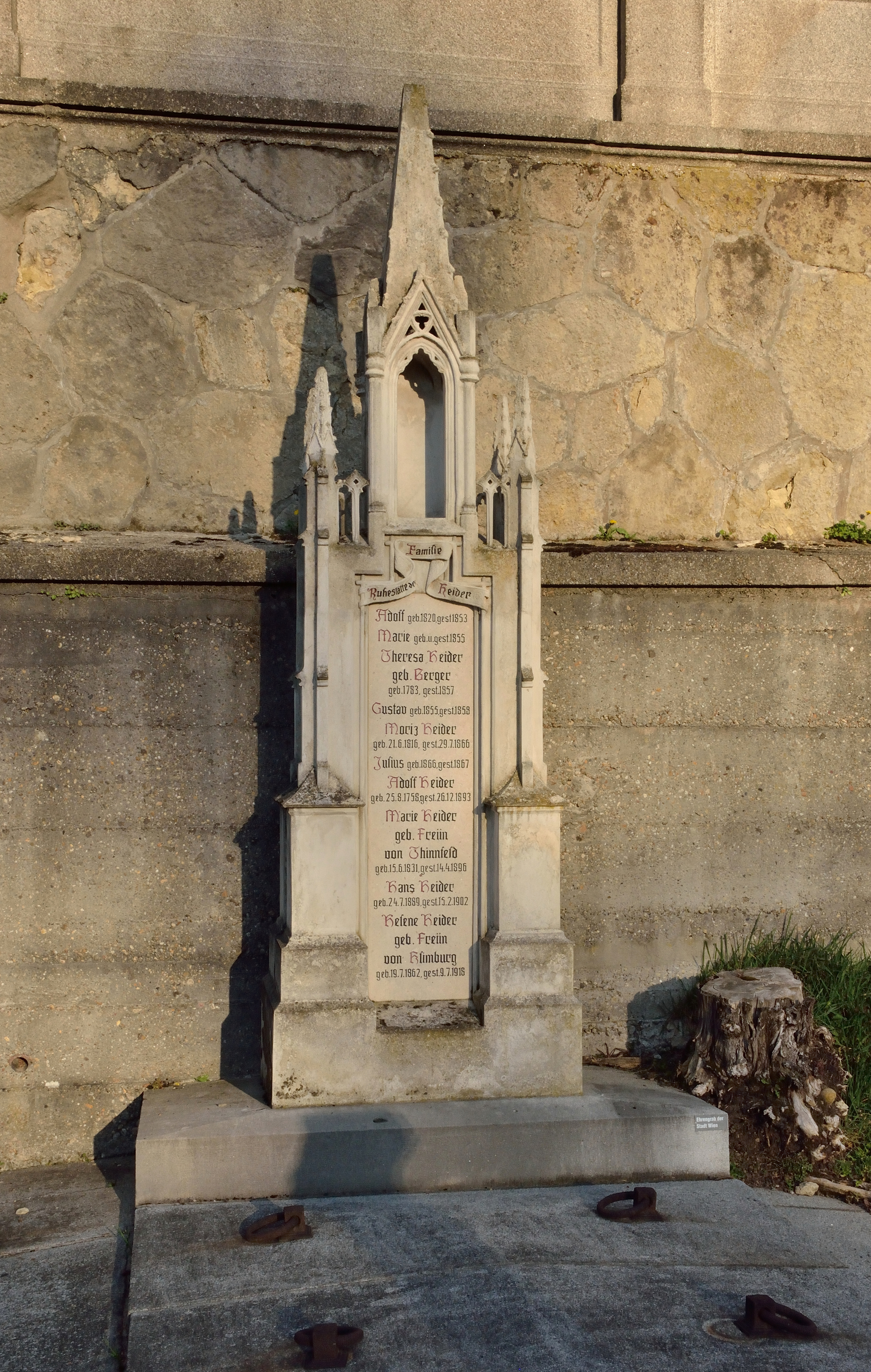 Grabmal des österreichischen Zahnarztes Moriz Heider am Hietzinger Friedhof, Gruppe 6, Nr. 29.